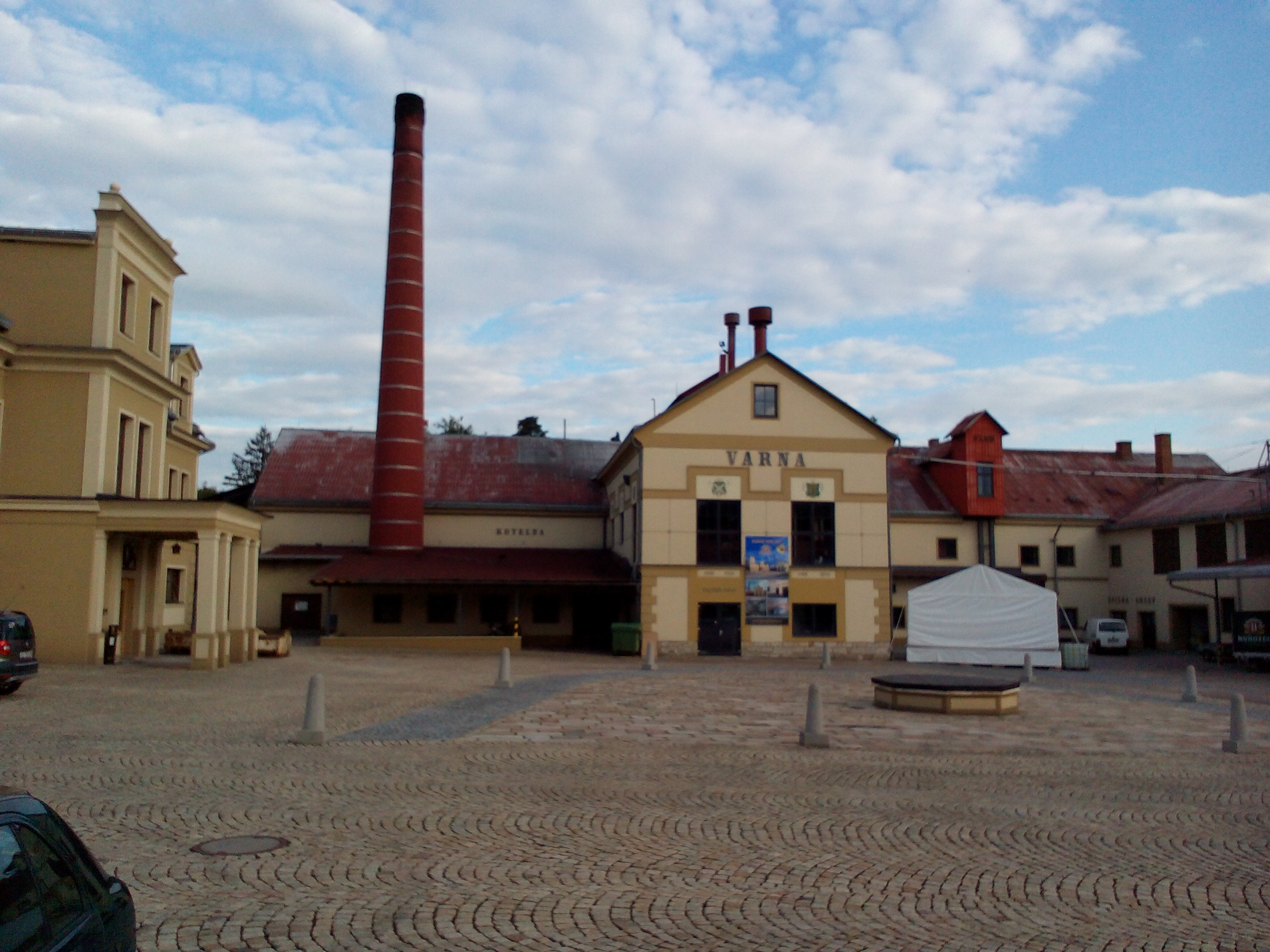 Malý Rohozec - zámek a pivovar